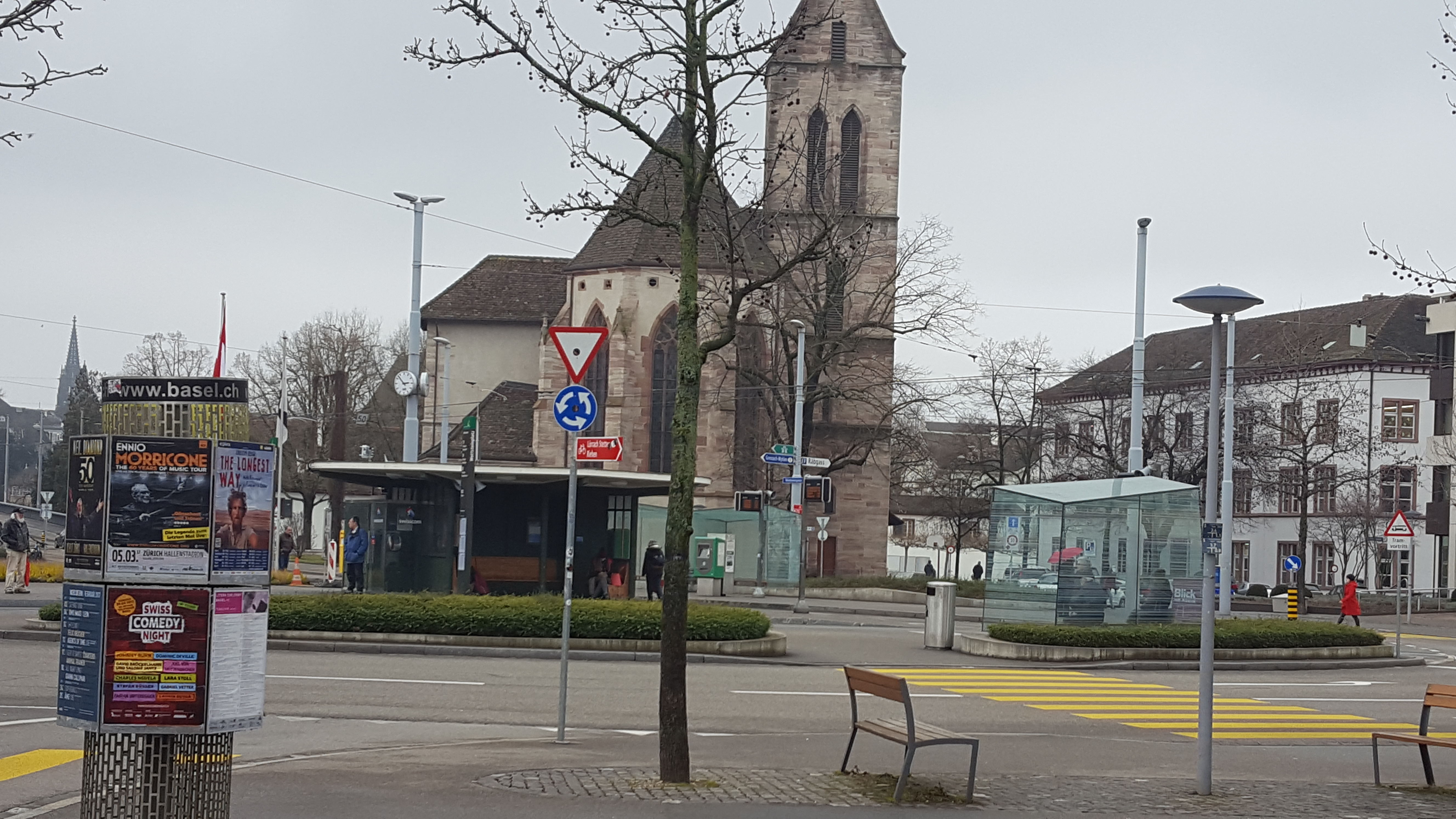 Basel, Theodorskirche vom Wettsteinplatz aus